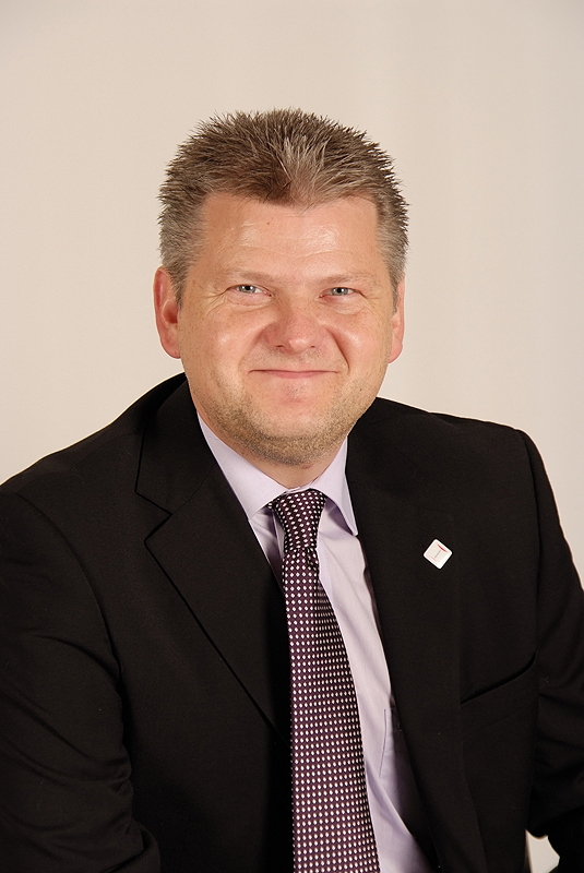 Stefan Politze, Landtagsabgeordneter Niedersachsen, 16. Wahlperiode (Fotoprojekt Landtagsabgeordnete Niedersachsen am 24. und 25. November 2009)